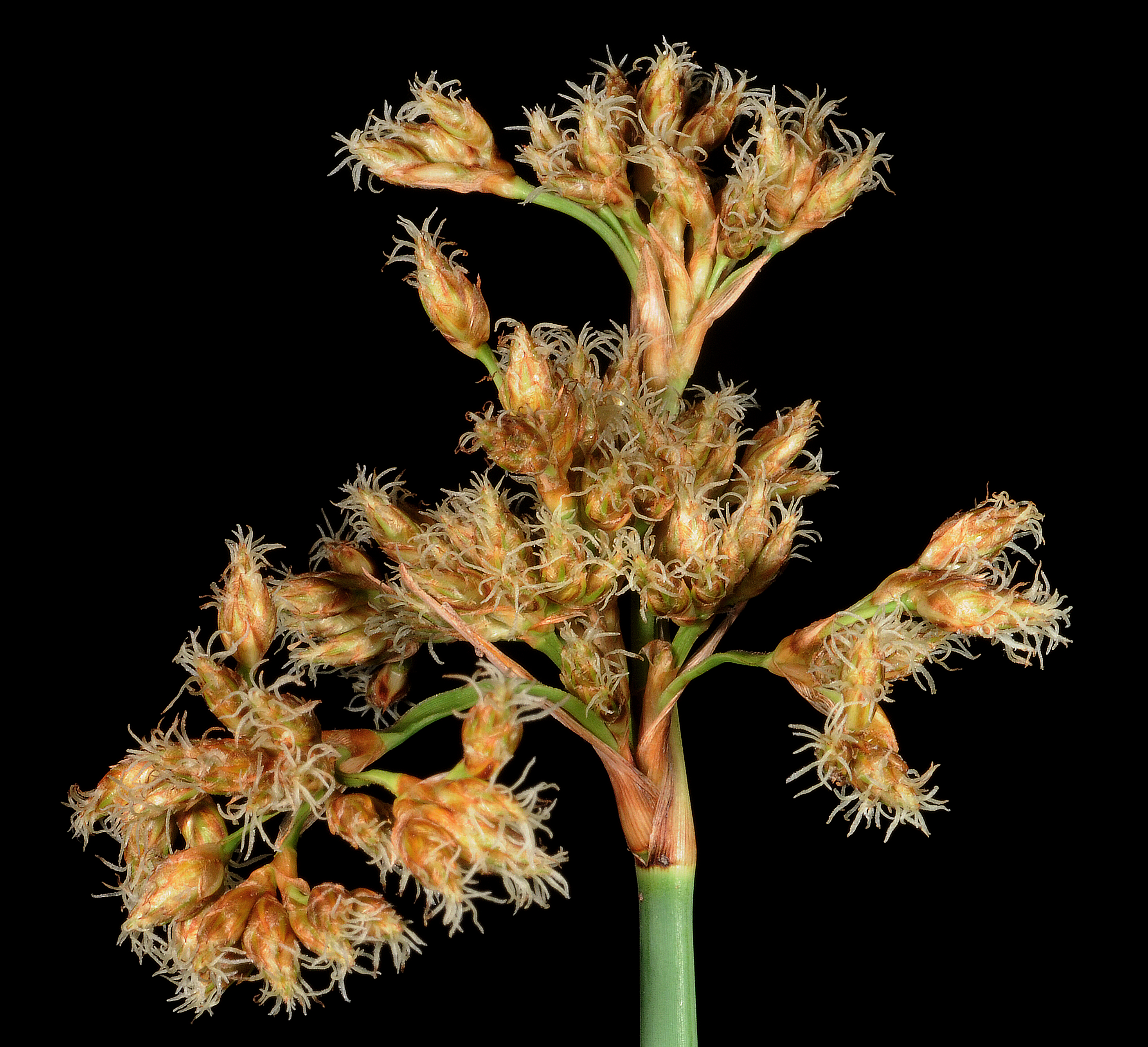 KRT3936